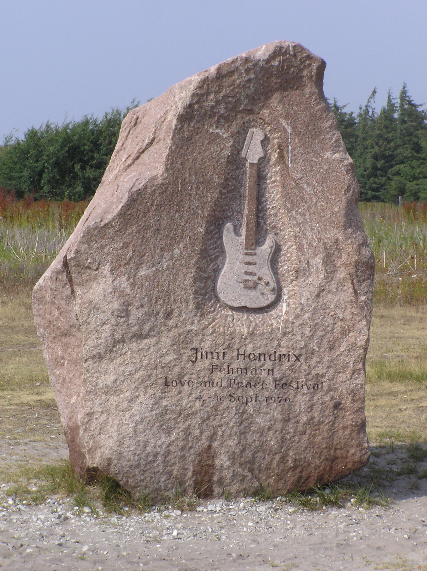 Memorial of Jimi Hendrix Flügge/Fehmarn Schleswig-Holstein,Germany